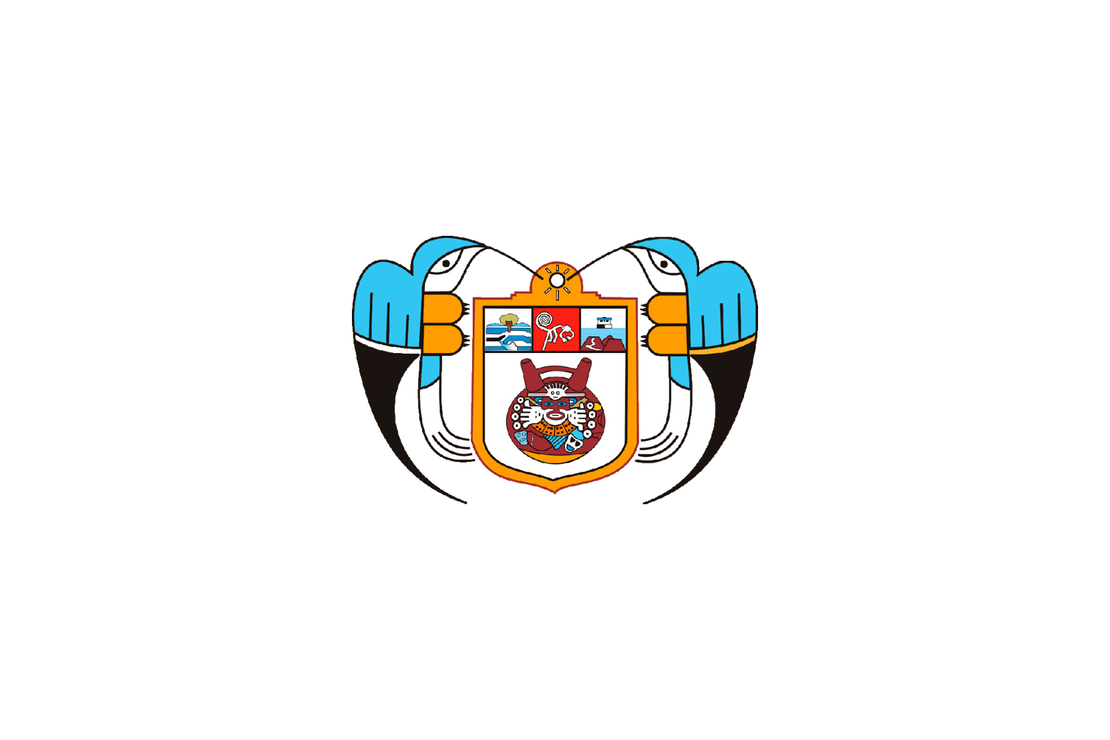 Bandera de Nazca, Ica